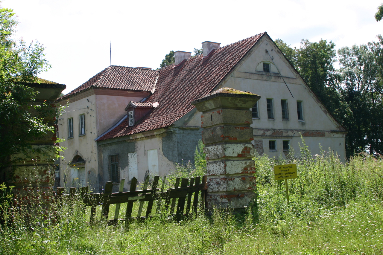 maciejki - dwór - OpenStreetMap(Info)